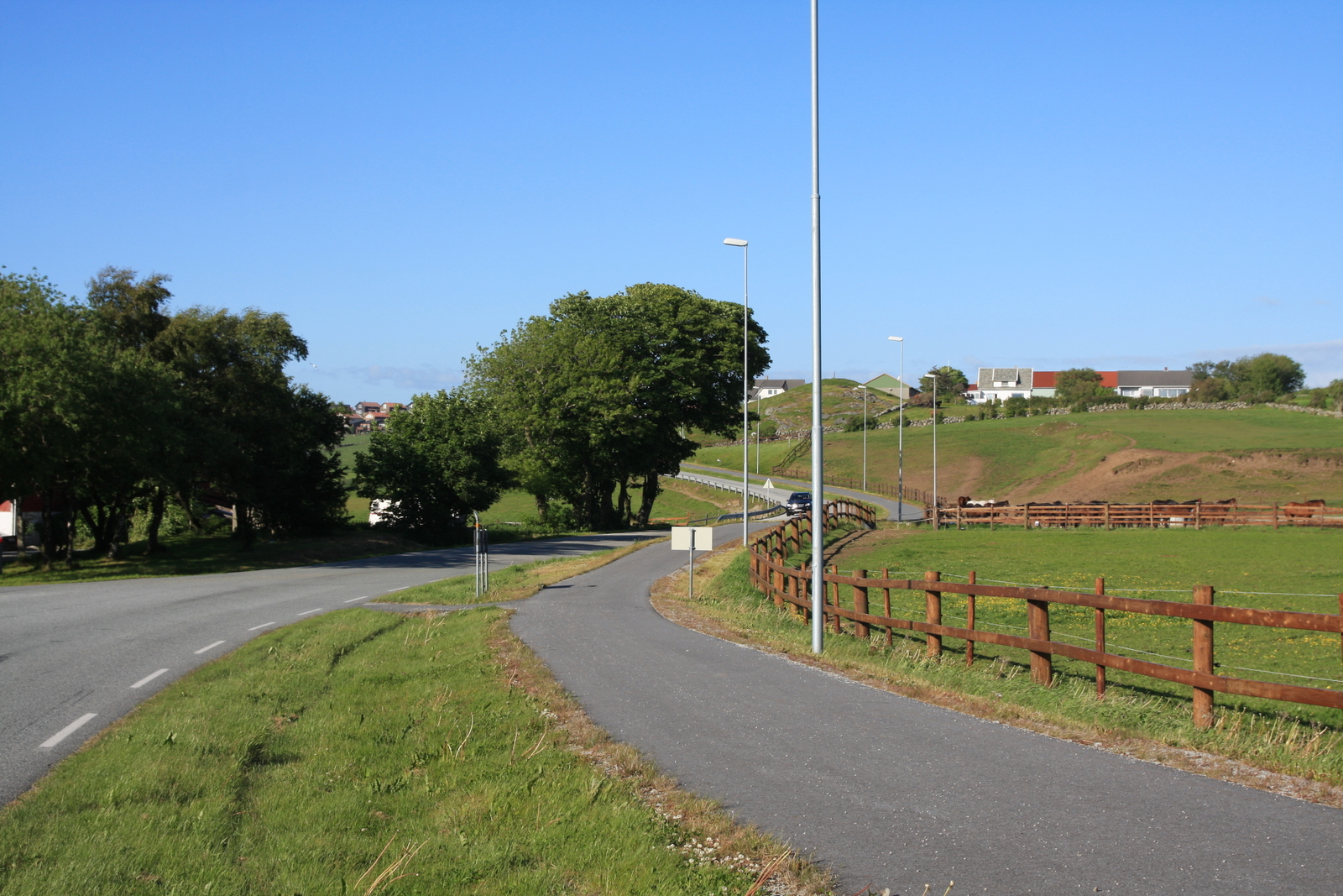 Fylkesvei 247 Orreveien